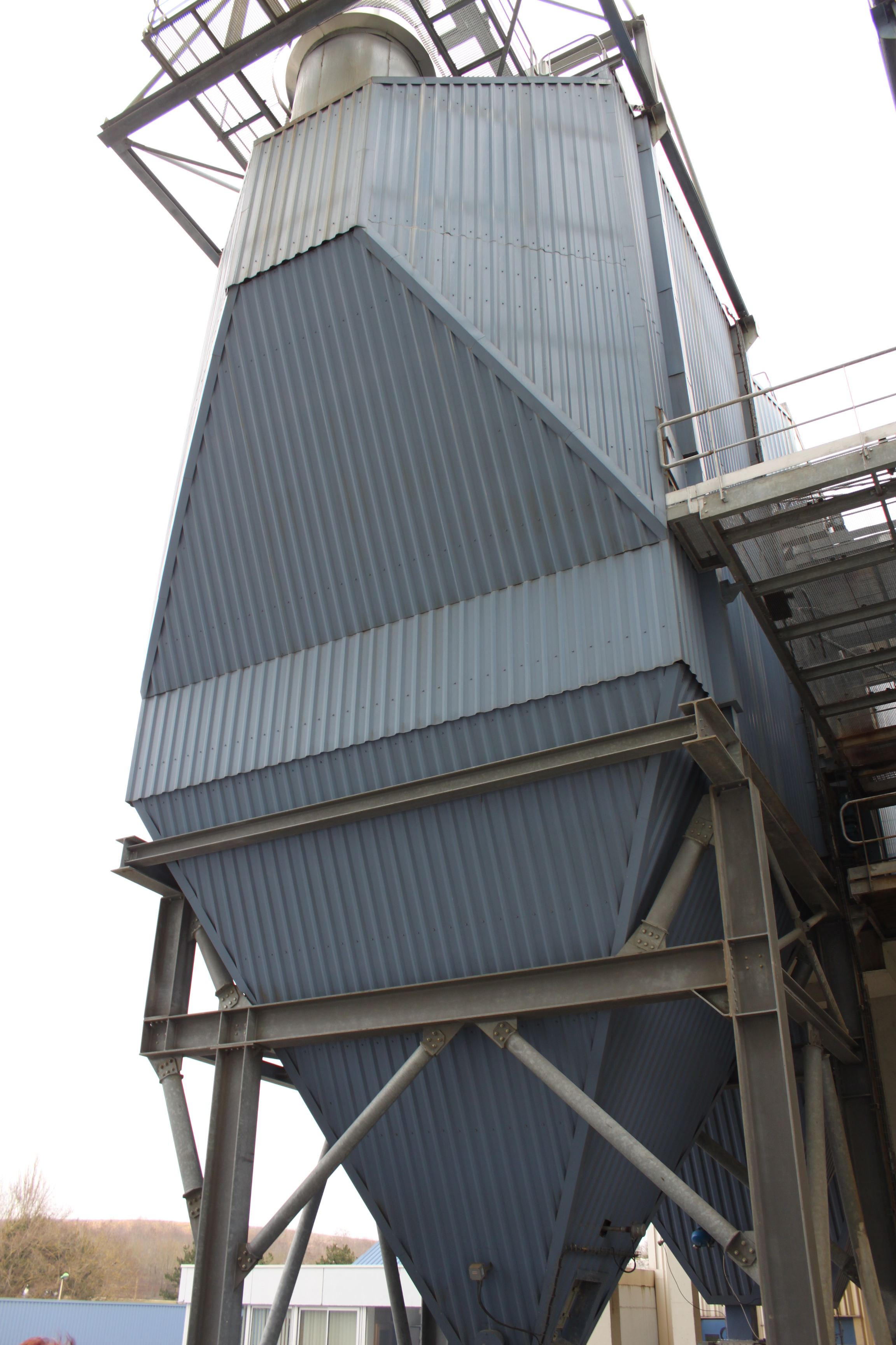 Usine d'Incinération d'ordures ménagères du grand Dijon, Dijon, Côte-d'Or, Bourgogne, France